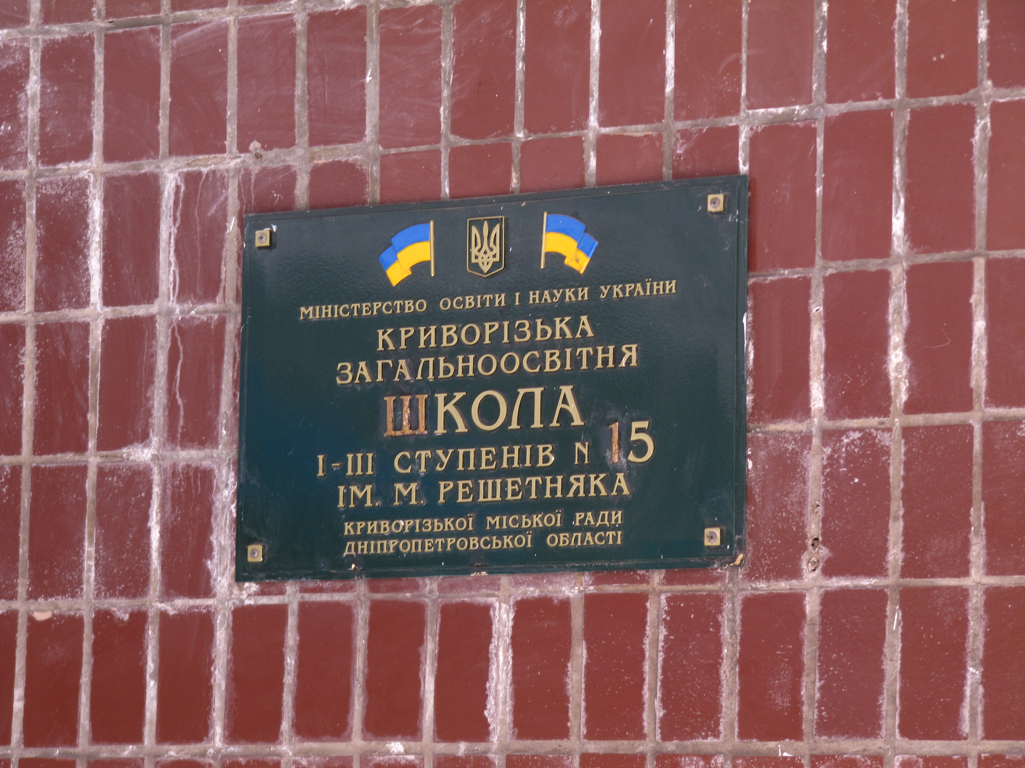 Школа в якій навчались п’ять комсомольців-підпільників, розстріляних 17 вересня 1943р., Кривий Ріг, вул. Орджонікідзе, 40, СШ № 15 ім. М. Решетняка. Школу було відбудовано заново на тому-ж місці.